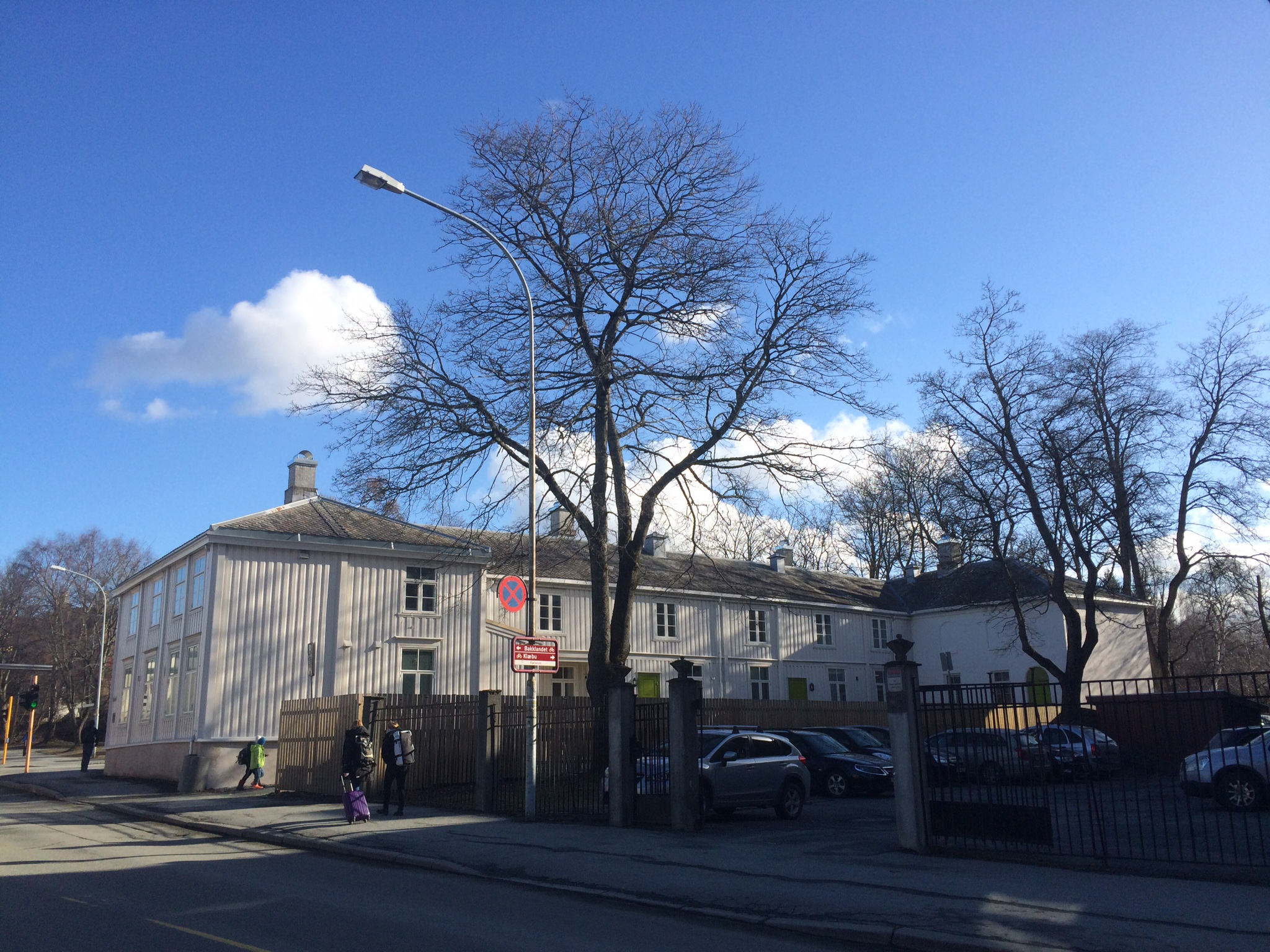 Elgeseter gård sett fra Klostergata